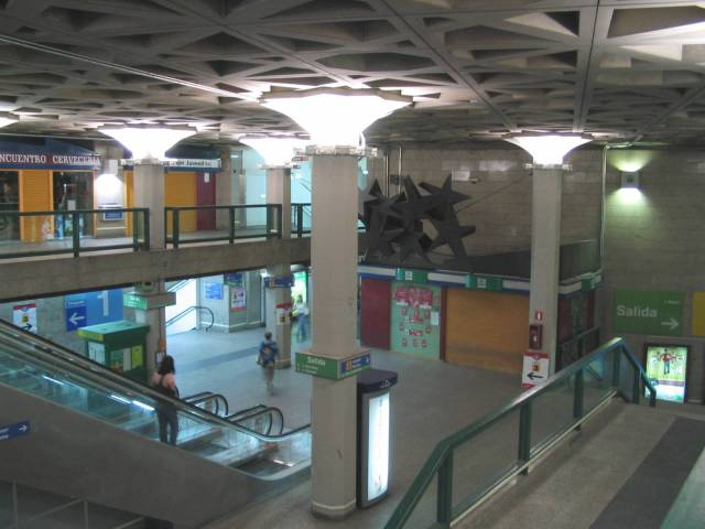 Vestíbulo de la estación de Metro de Sol (Madrid) Foto tomada por valyag con cámara digital